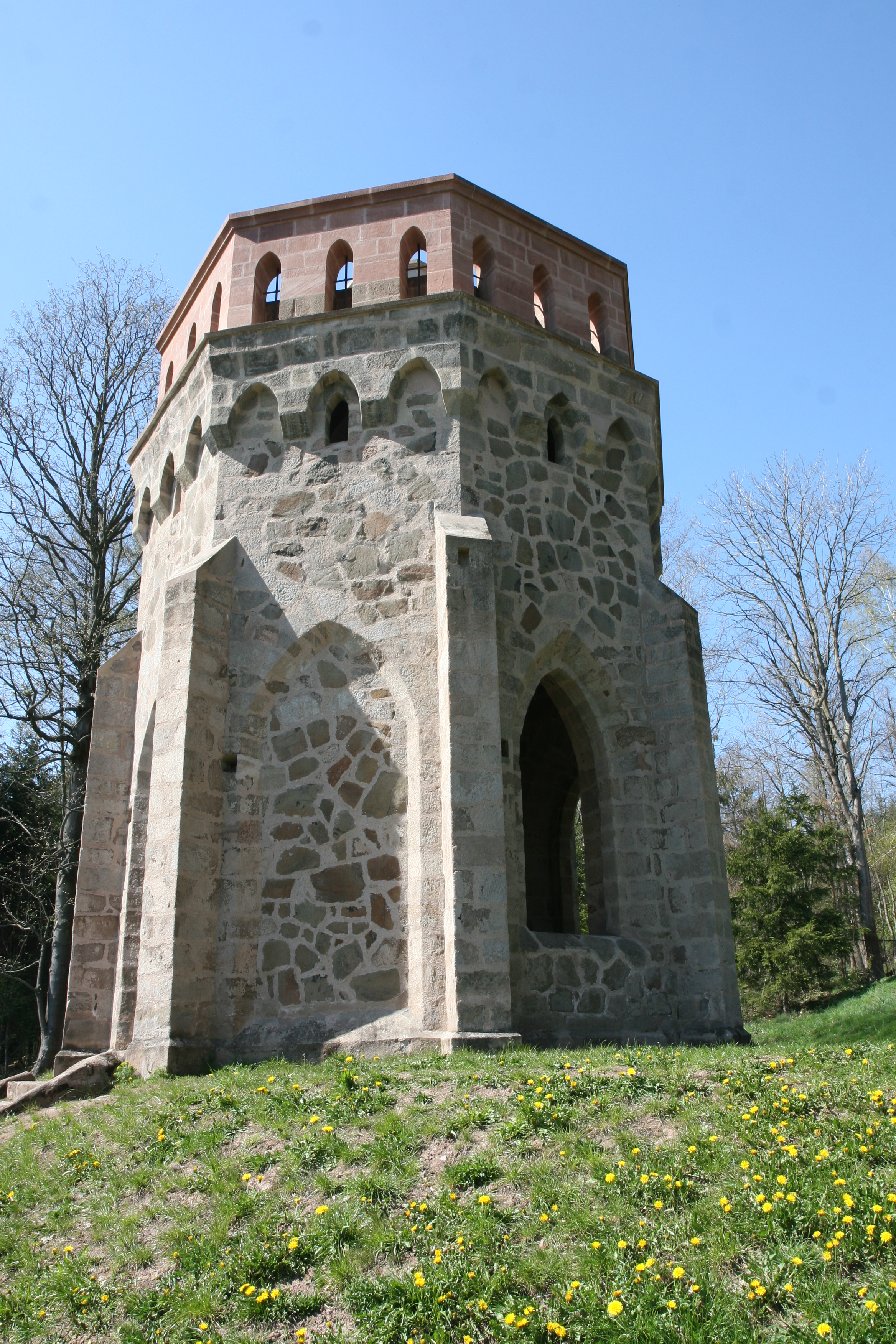 Nika A.V.